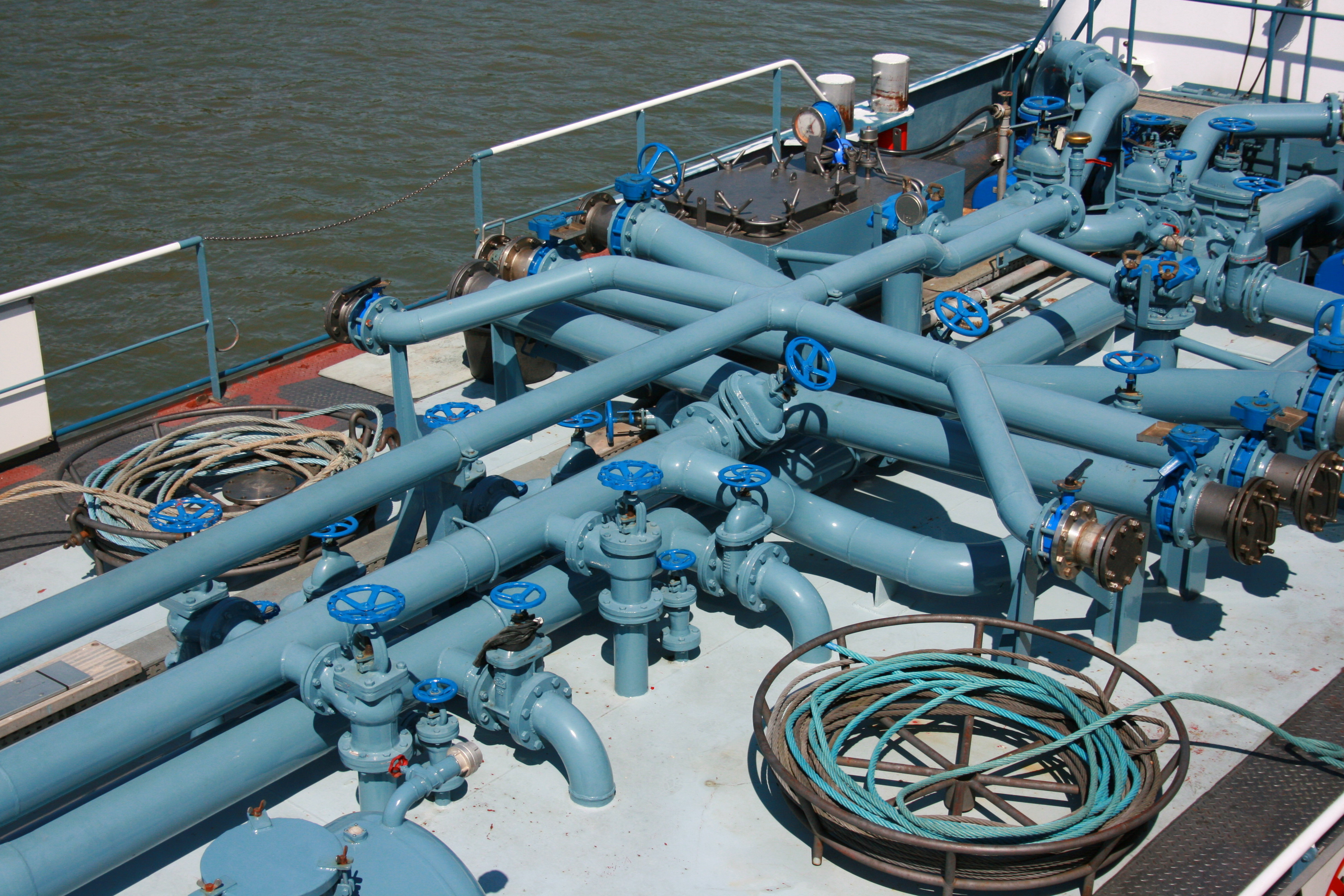 Unterwasser am Schiffshebewerk Scharnebeck: TMS Charisma aus Zehdenick, ENI:05301240